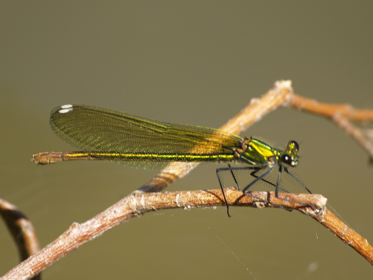 Calopteryx xanthostoma